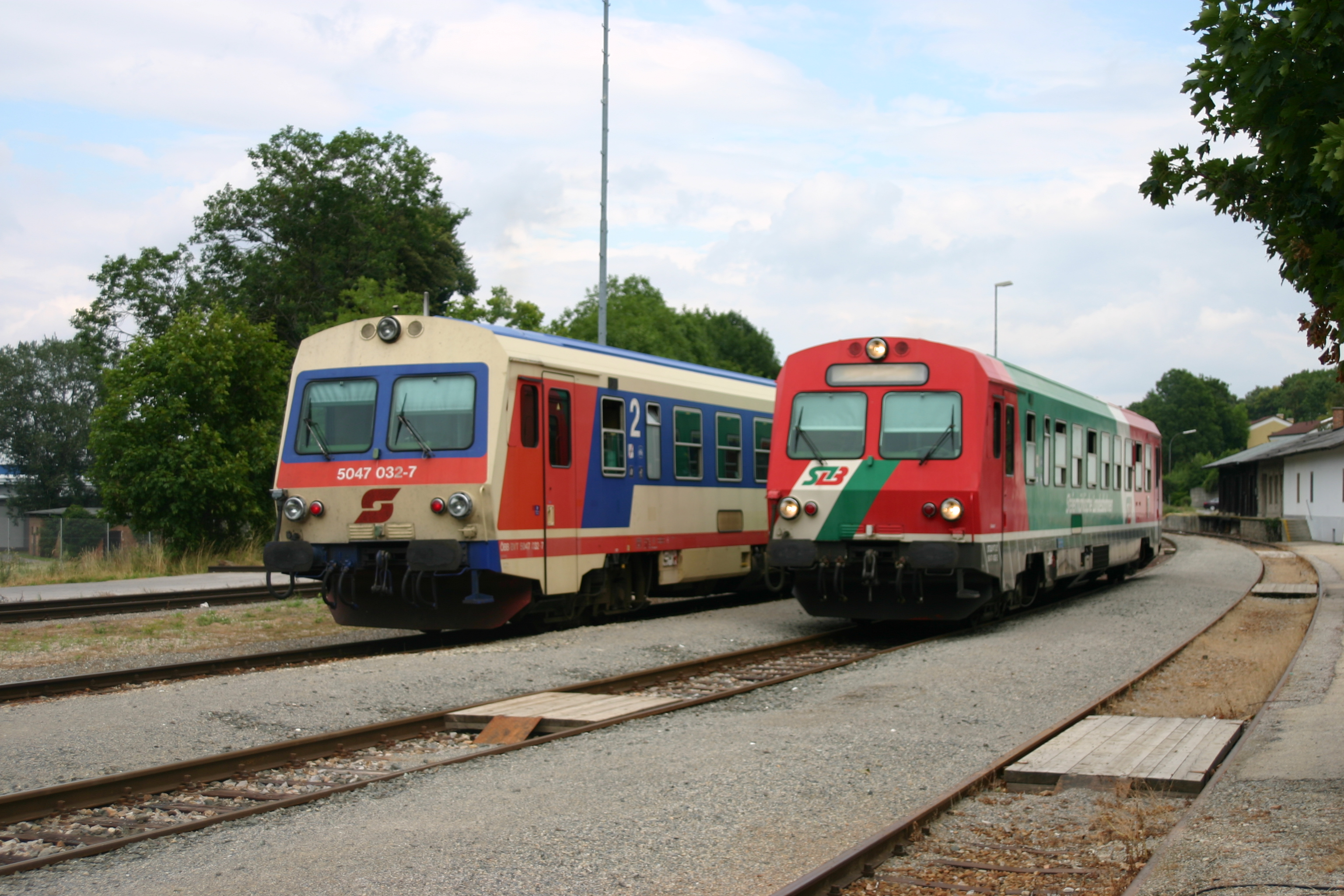 ÖBB 5047.032 und STLB VT 52 5047.402 in Enzesfeld/Lindabrun